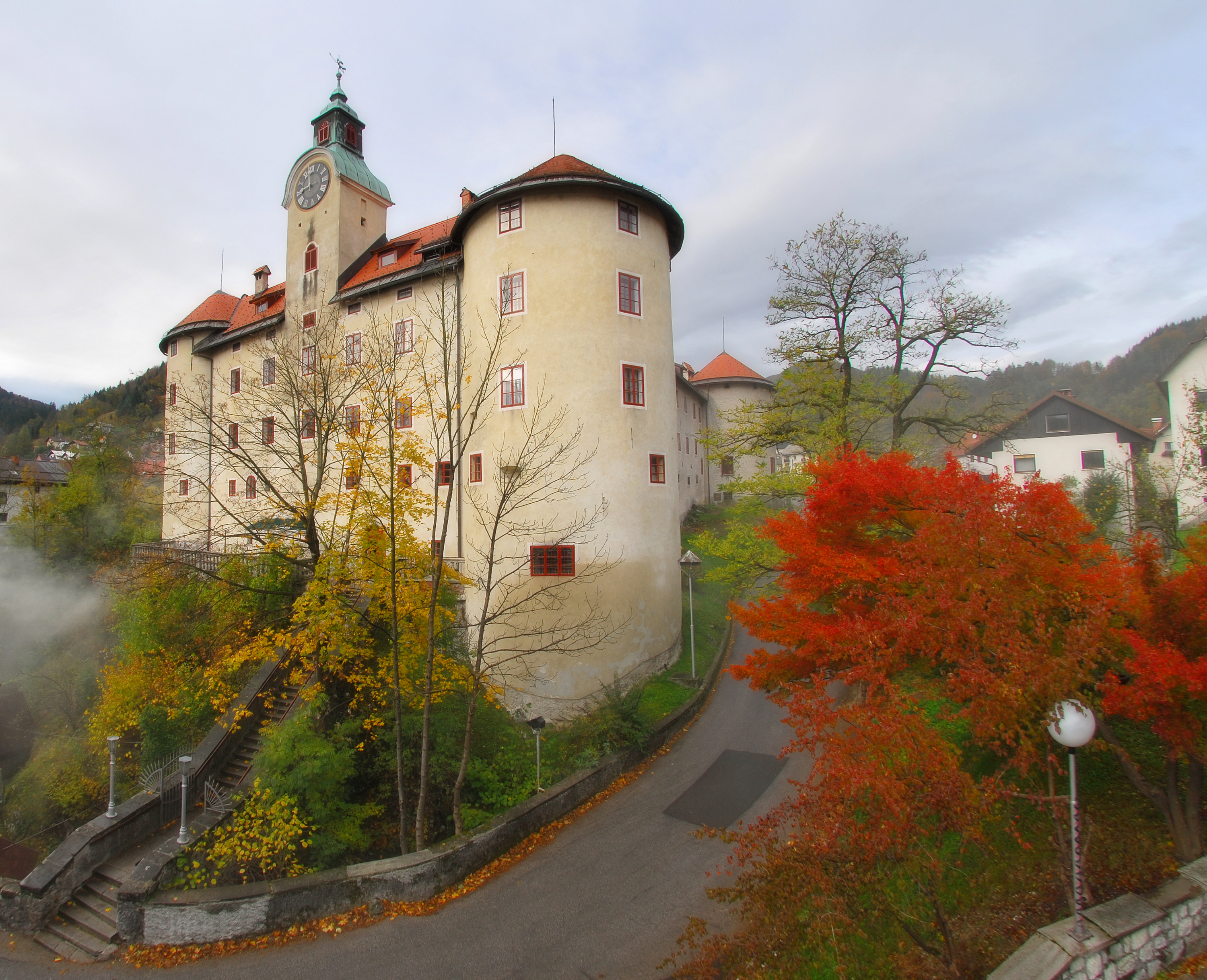 Grad Gewerkenegg